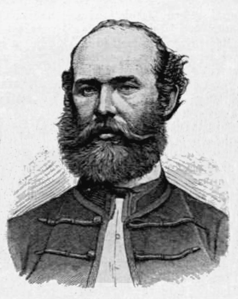 Tolnai Lajos (születési nevén: Hagymássy Lajos; Györköny, 1837. január 31. – Budapest, 1902. március 19.) költő, író, publicista Pollák Zsigmond metszetén.